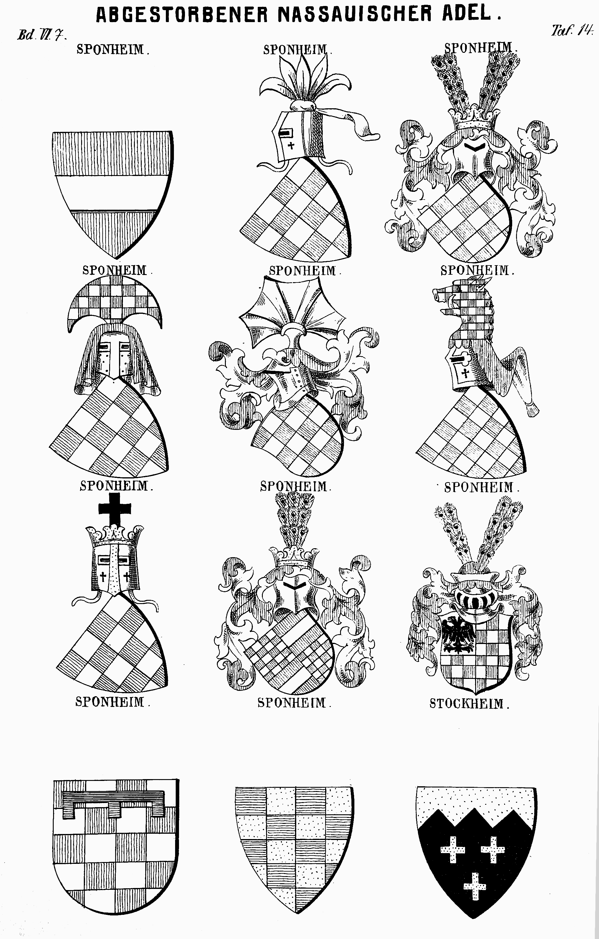 Verschiedene Wappen der Sponheimer Dynastie